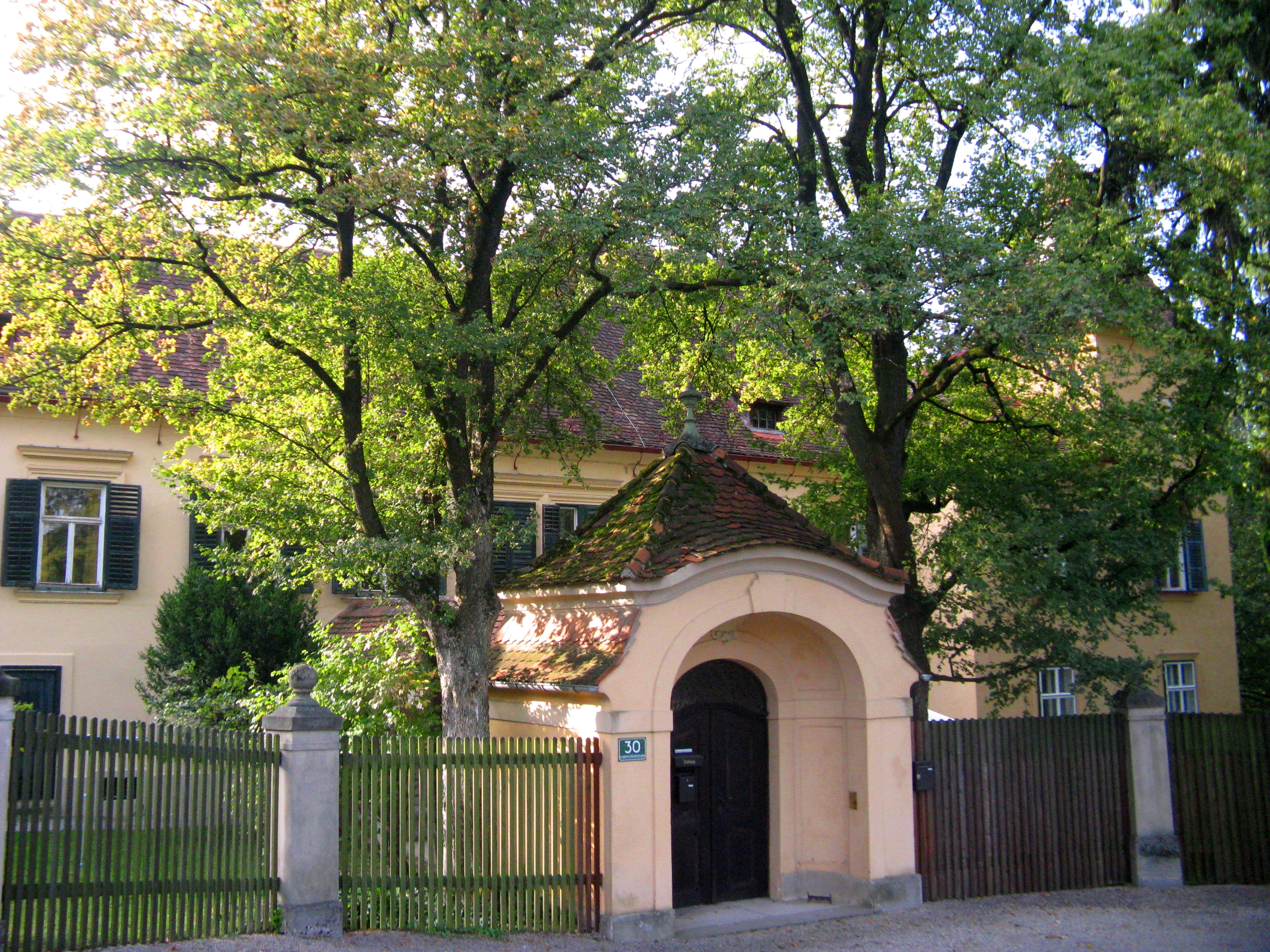 Hallerschloss mit Wirtschaftsgebäude und Gartendenkmale